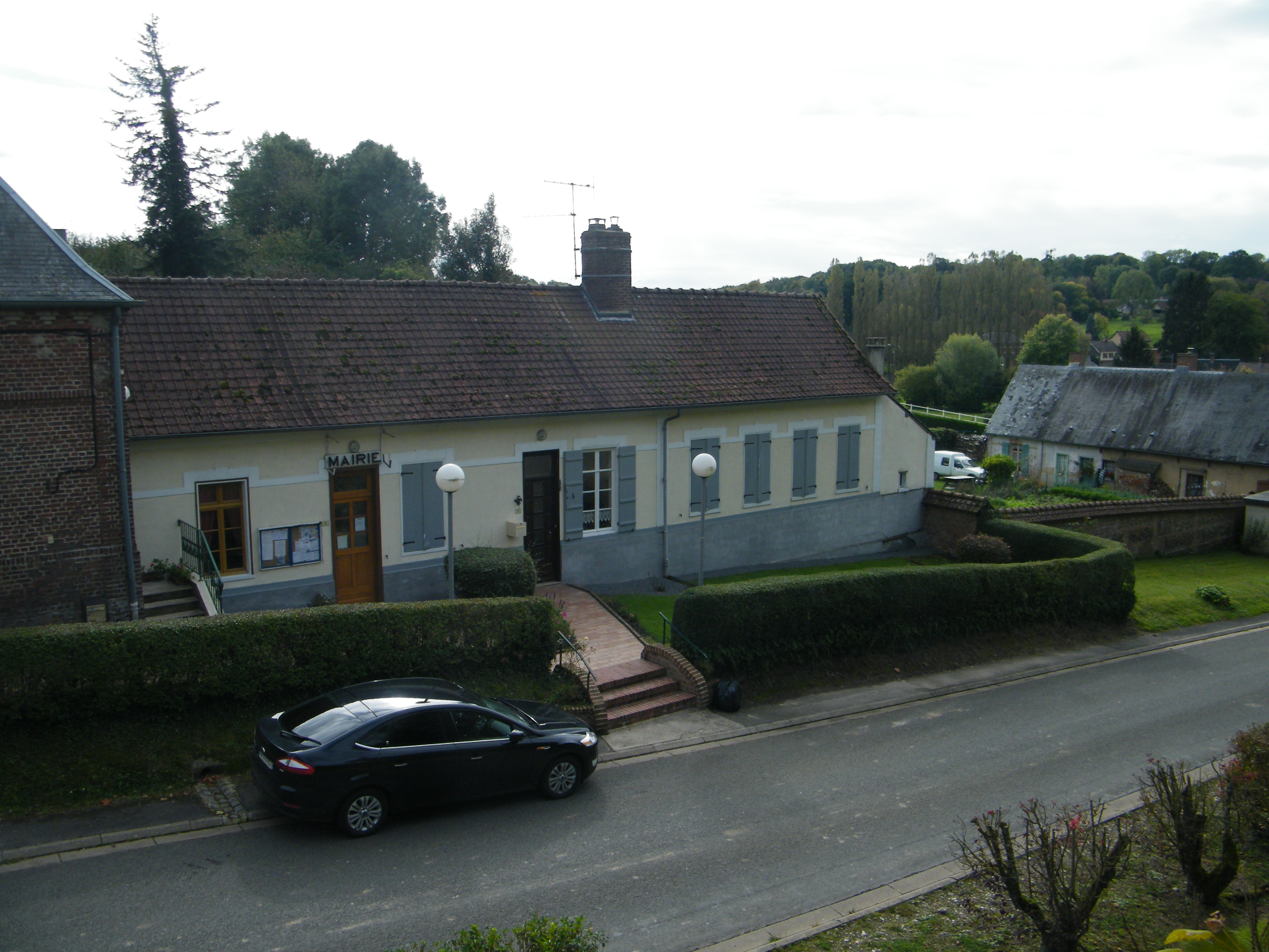 Toeufles, Somme, Fr, Mairie